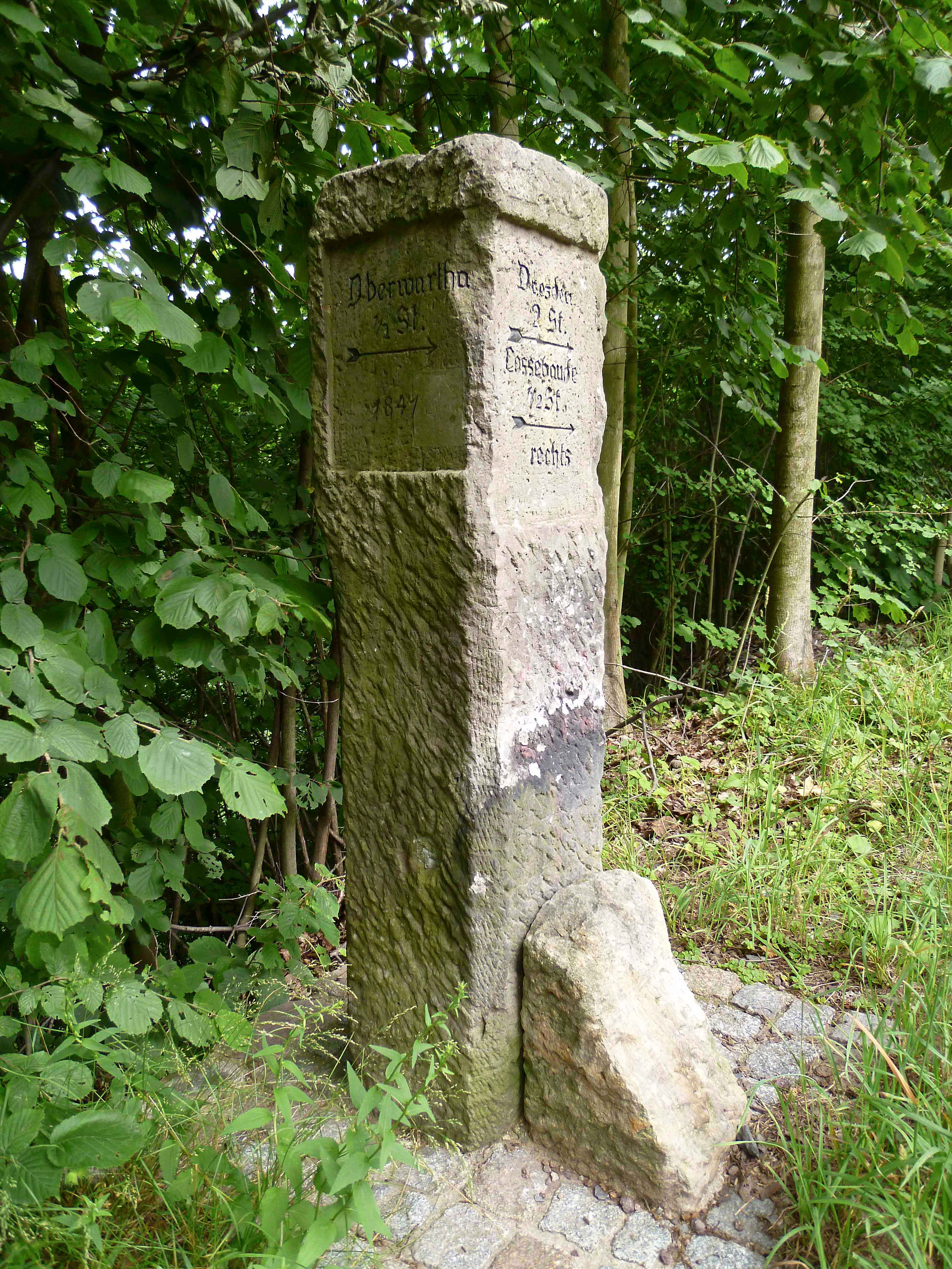 Historischer Distanzstein in Niederwartha, Tännichtgrundstraße